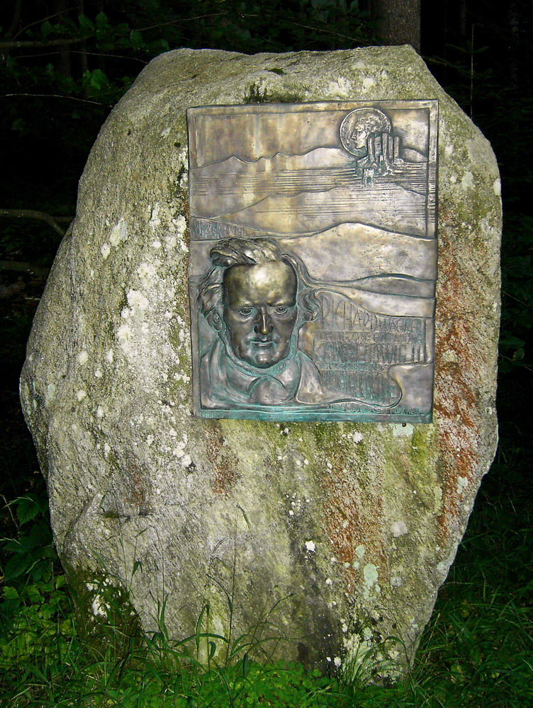 Richard-Wagner-Denkmal am Walchenseesüdufer beim Forsthaus Altlach